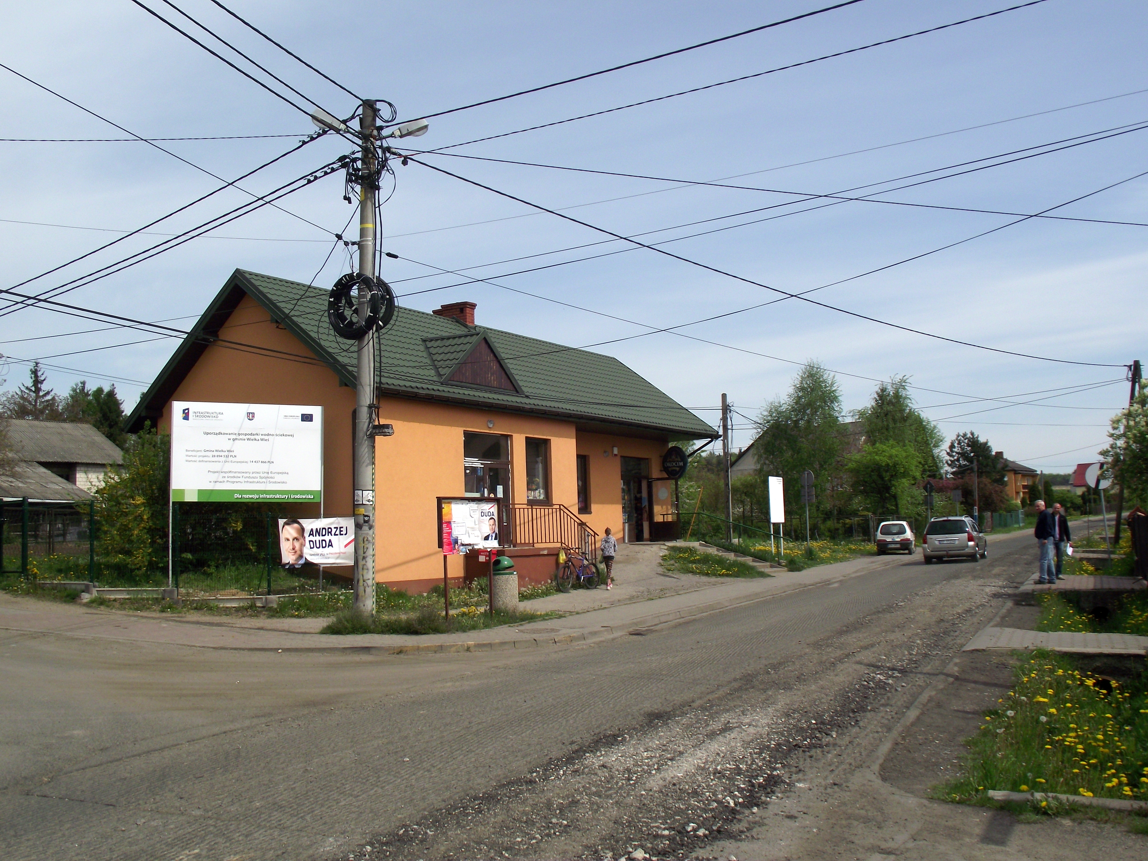 Obchod v Czajowicích, Malopolsko.